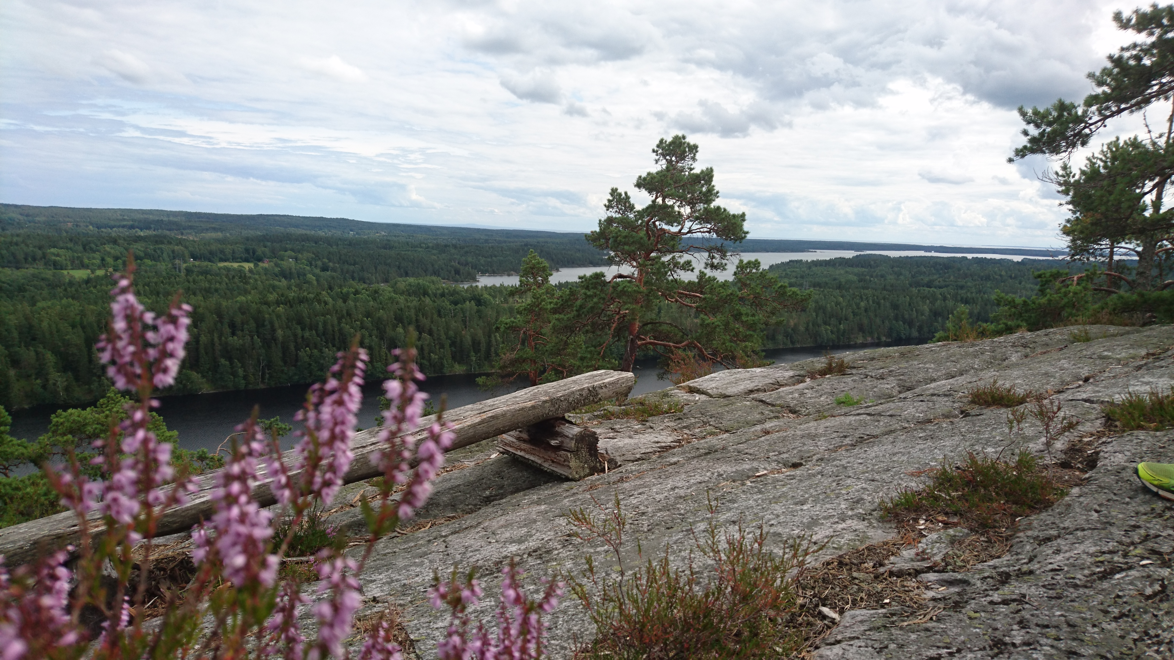 Utsikt från Sörknattens naturreservat i Dalsland